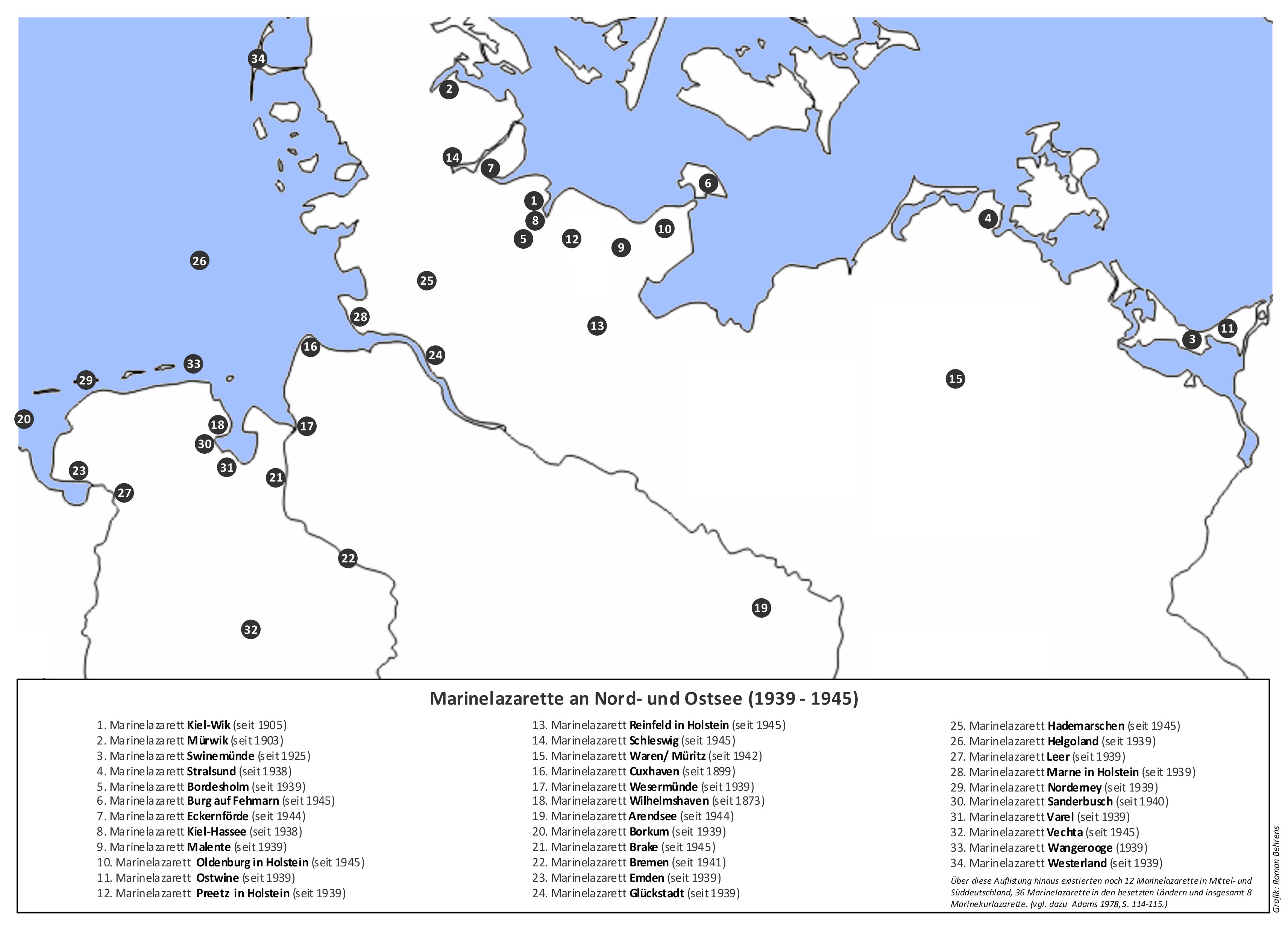 Übersicht der Marinelazarette zur Zeit des Zweiten Weltkriegs